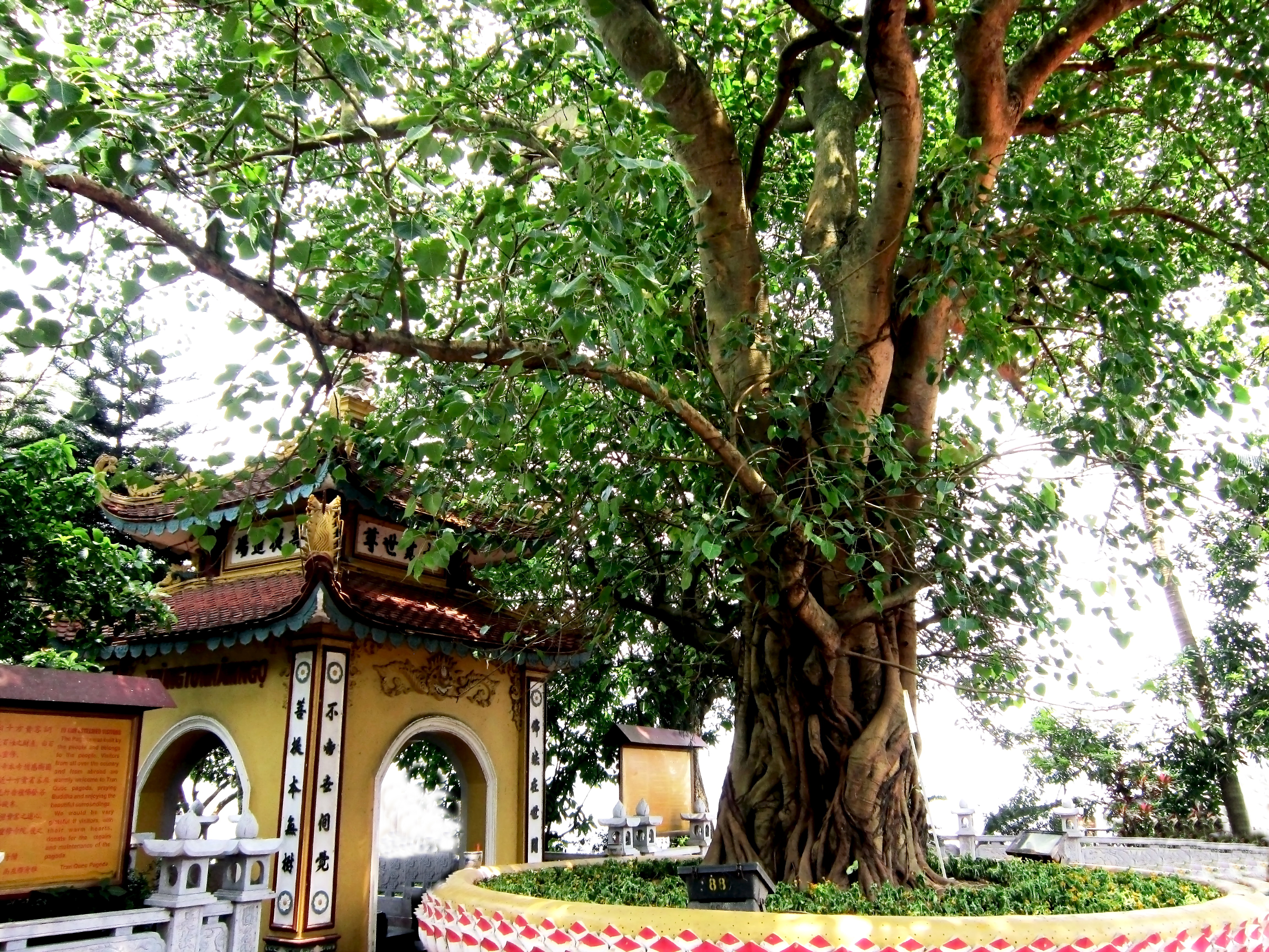 Cây bồ đề ở sân chùa Trấn Quốc (Hà Nội) có nguồn gốc từ Bồ Đề Đạo Tràng ở Ấn Độ do Tổng thống nước này tặng khi ông đến thăm Hà Nội năm 1959.